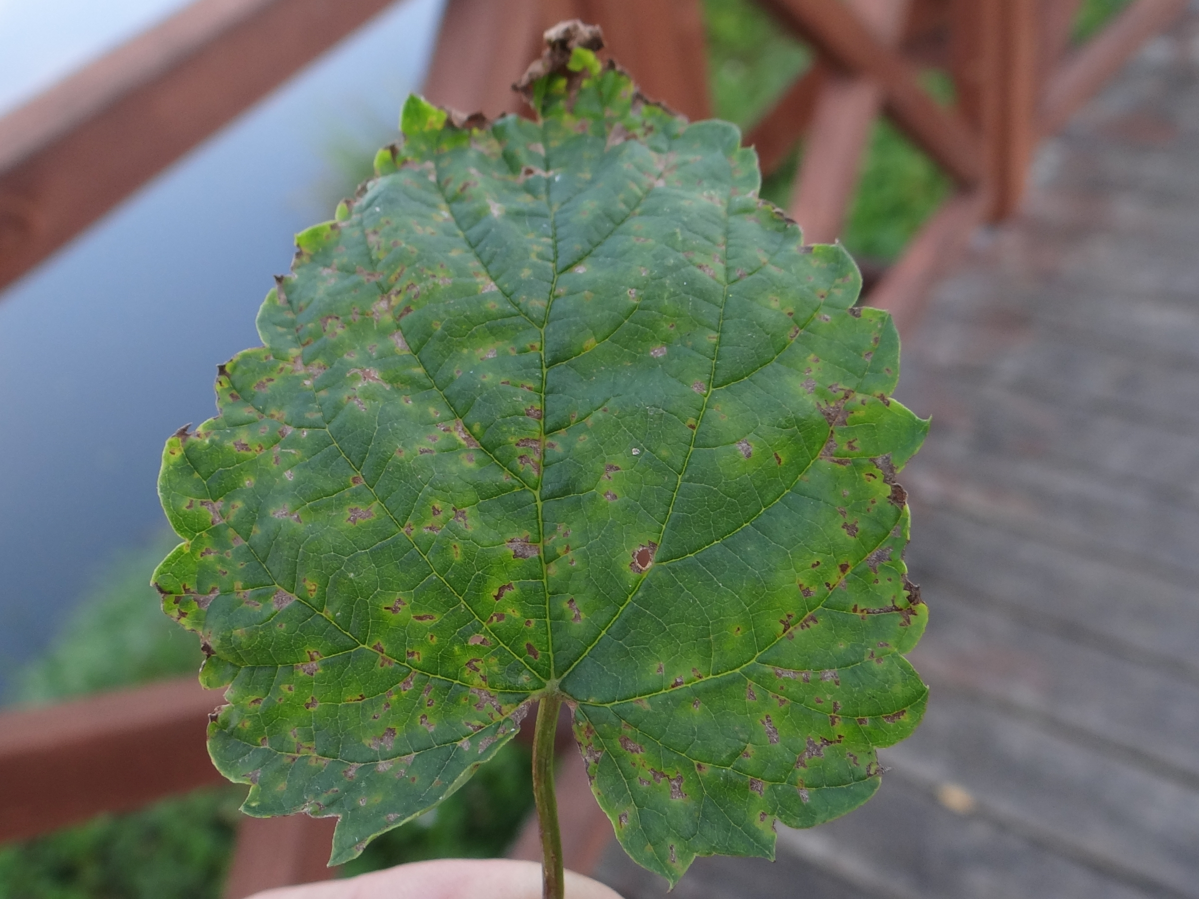 Pseudoperonospora cubensis on Humulus lupulus. Location: Poland, Mstów, powiat częstochowski